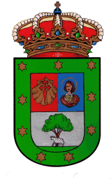 Escudo del municipio de Barrios de Colina en la provincia de Burgos (España). Escudo medio partido y cortado. Primero, de gules venera de oro, cargada con Cruz de Santiago de gules. Segundo, de azur busto de santo a su color con aureola de santidad en oro. Tercero, de plata, roble terrazado y carnero pasante a su color. Bordura de sinople cargada con nueve estrellas de oro, de seis puntas. Al timbre corona real de España.